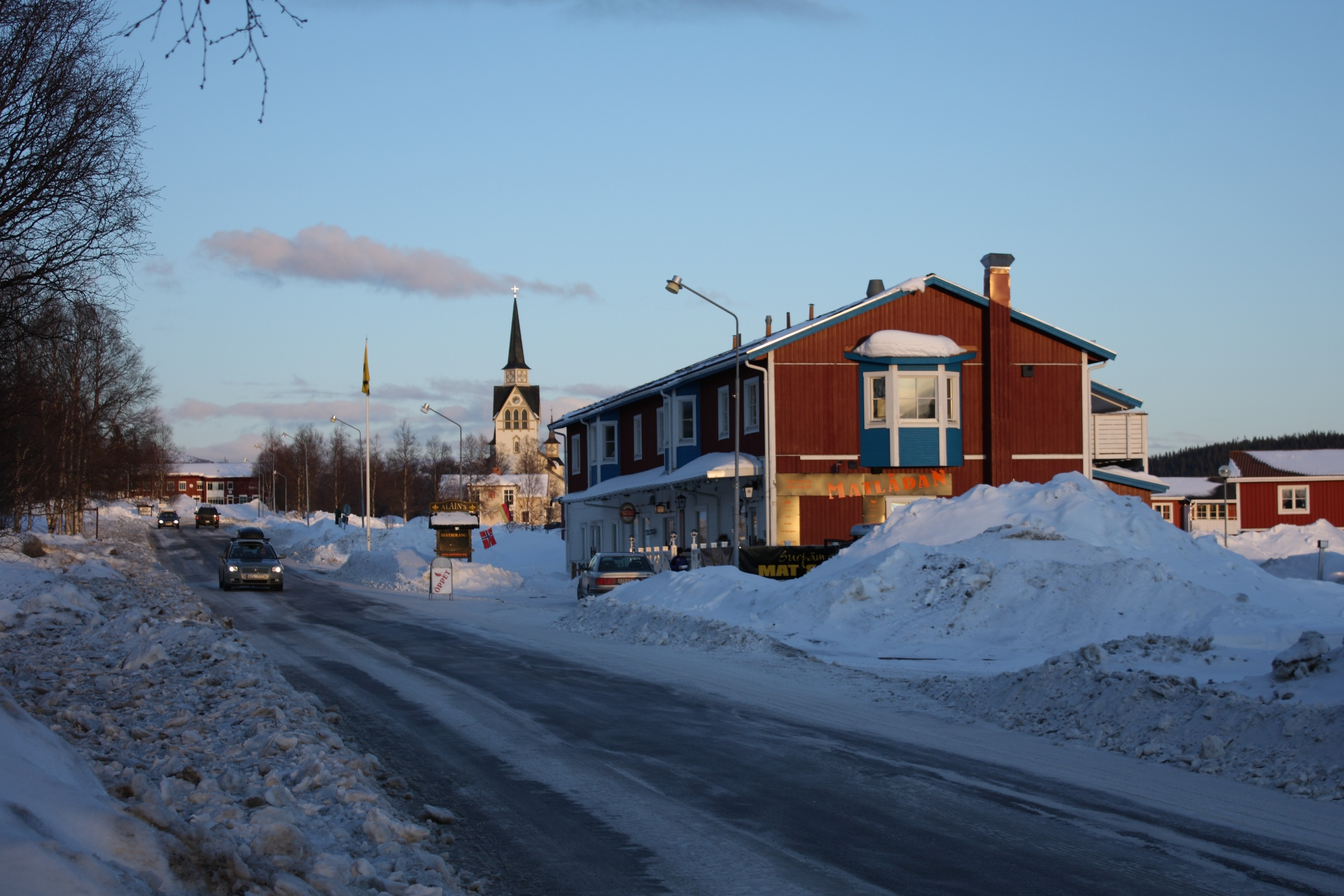 Duved's center in Åre, Sweden.